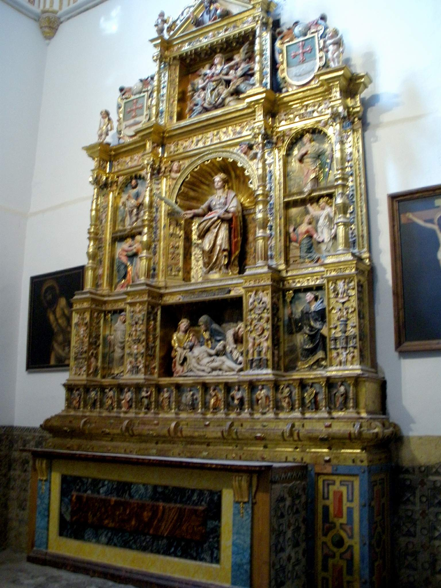 Capilla de Santa Lucía, Catedral de Palencia